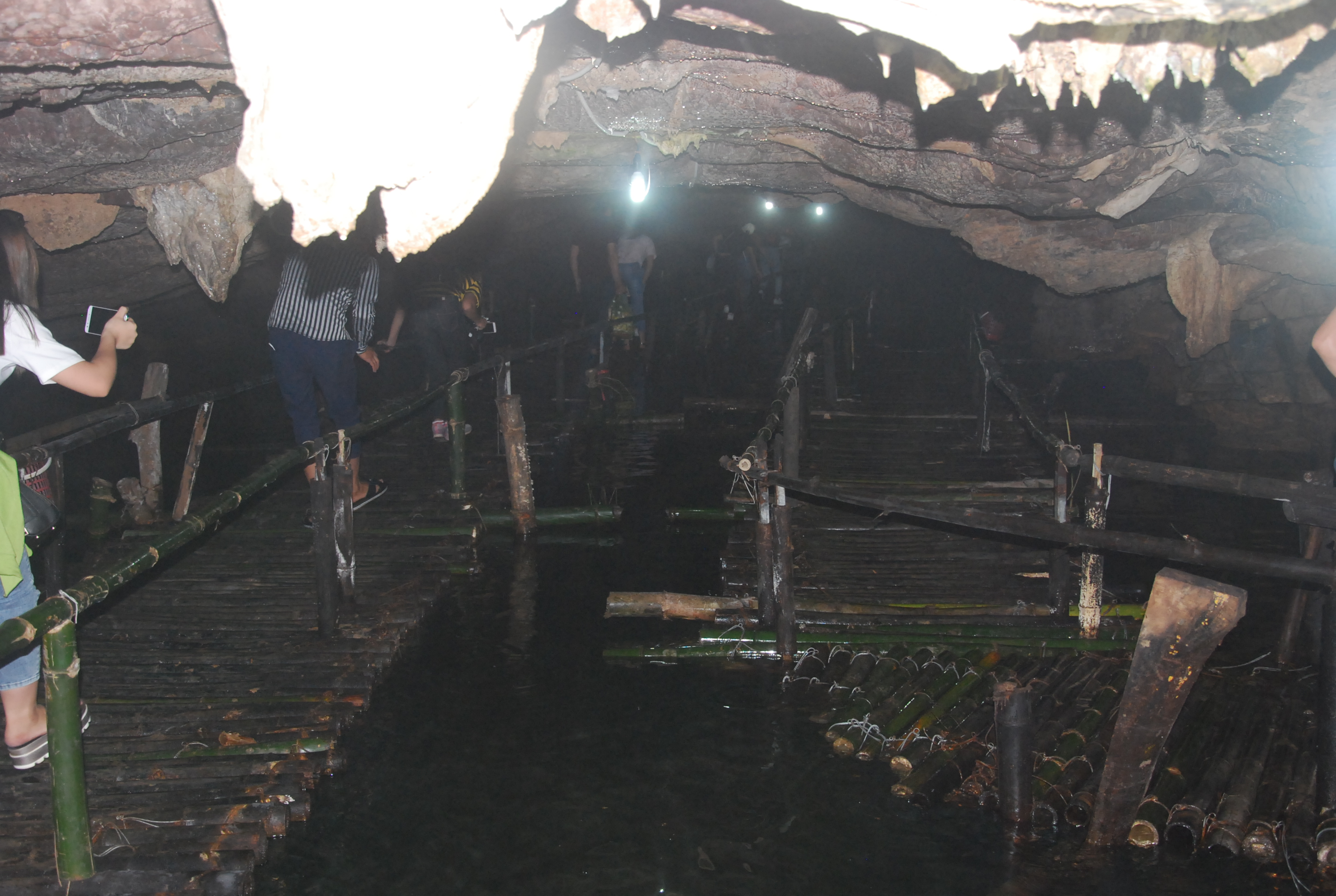 Động Tiên Cá thuộc Thung Nham trong Quần thể di sản thế giới Tràng An